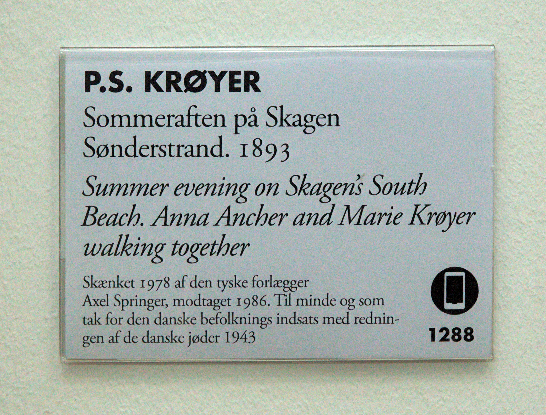 Skilt ved maleriet Sommeraften ved Skagen Sønderstrand på Skagens Museum